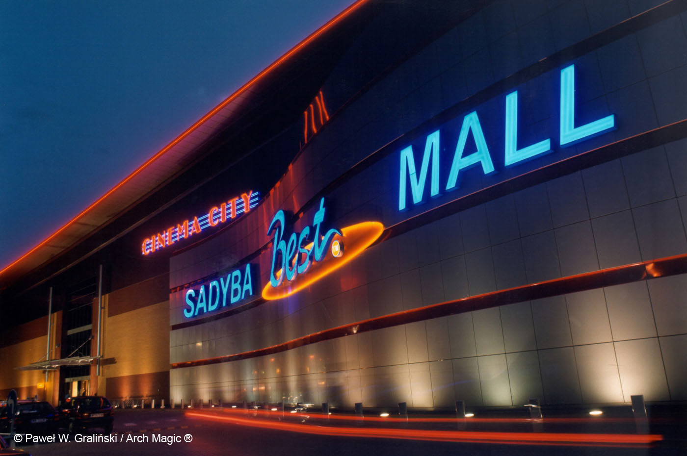 Ch Sadyba Best Mall Warszawa